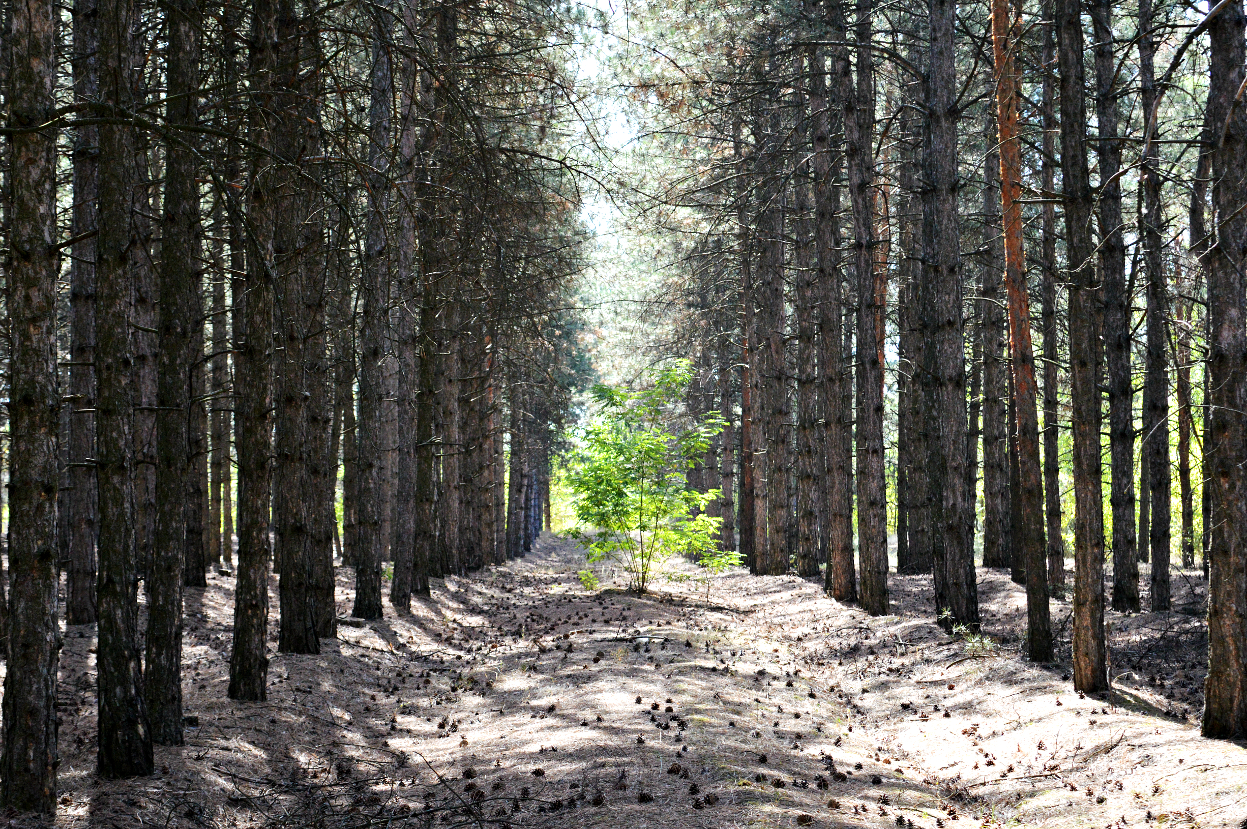 Дорошівка, Вознесенський р-н